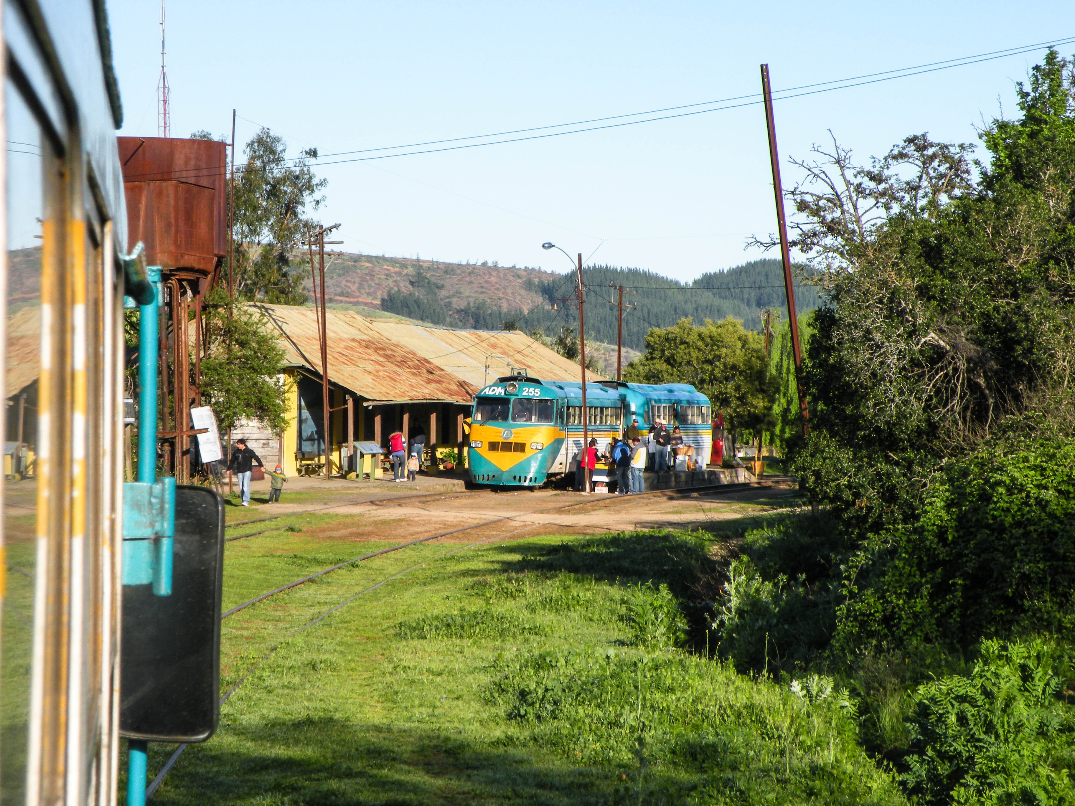 Cruzamiento de los buscarriles Ferrostaal, en Gonzales Bastias, que es el único lugar de este ramal en donde se pueden efectuar cruzamientos, haciendo de esta parada algo bastante interesante para los aventureros, ya que son alrededor de 5 minutos en que el tren se detiene, y los viajeros pueden disfrutar de los diversos menesteres que ofrecen los lugareños. Foto de hace un par de años atrás en donde iba cabeza afuera rumbo a Constitucion.